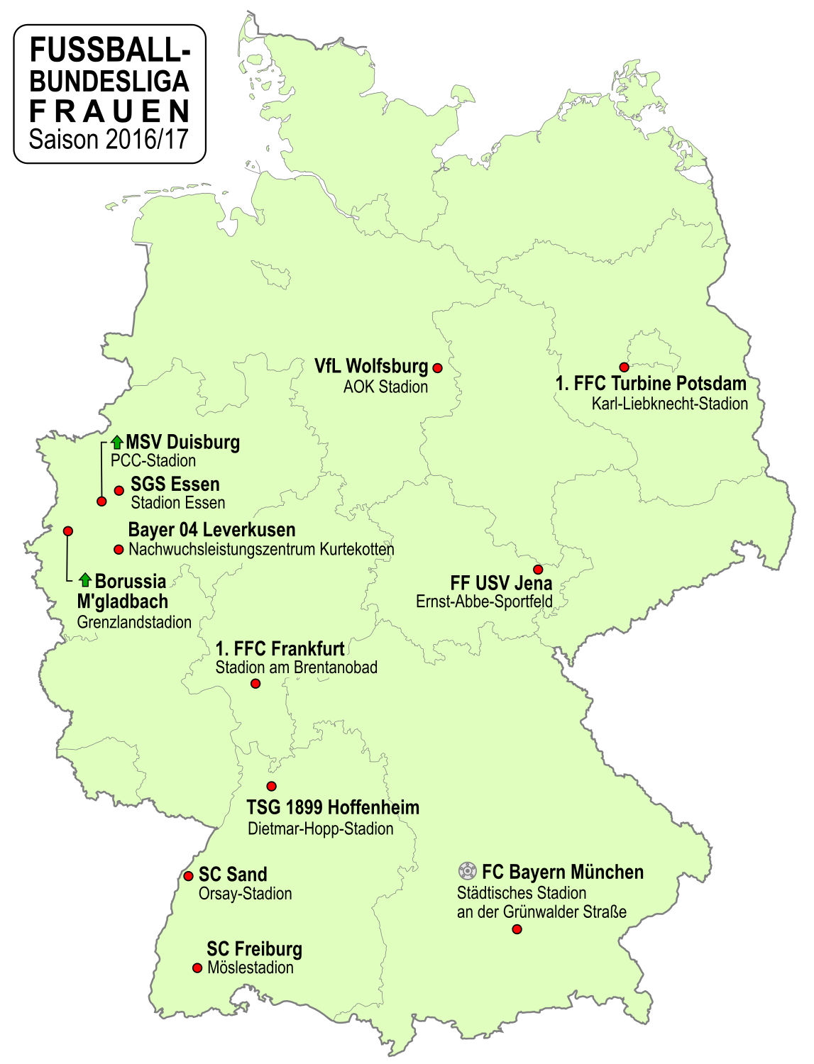 Karte der Vereine der Frauen Fußball-Bundesliga-Saison 2016/2017